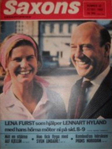 Saxons nr42 1966 Lena Fürst och Lennart Hyland.